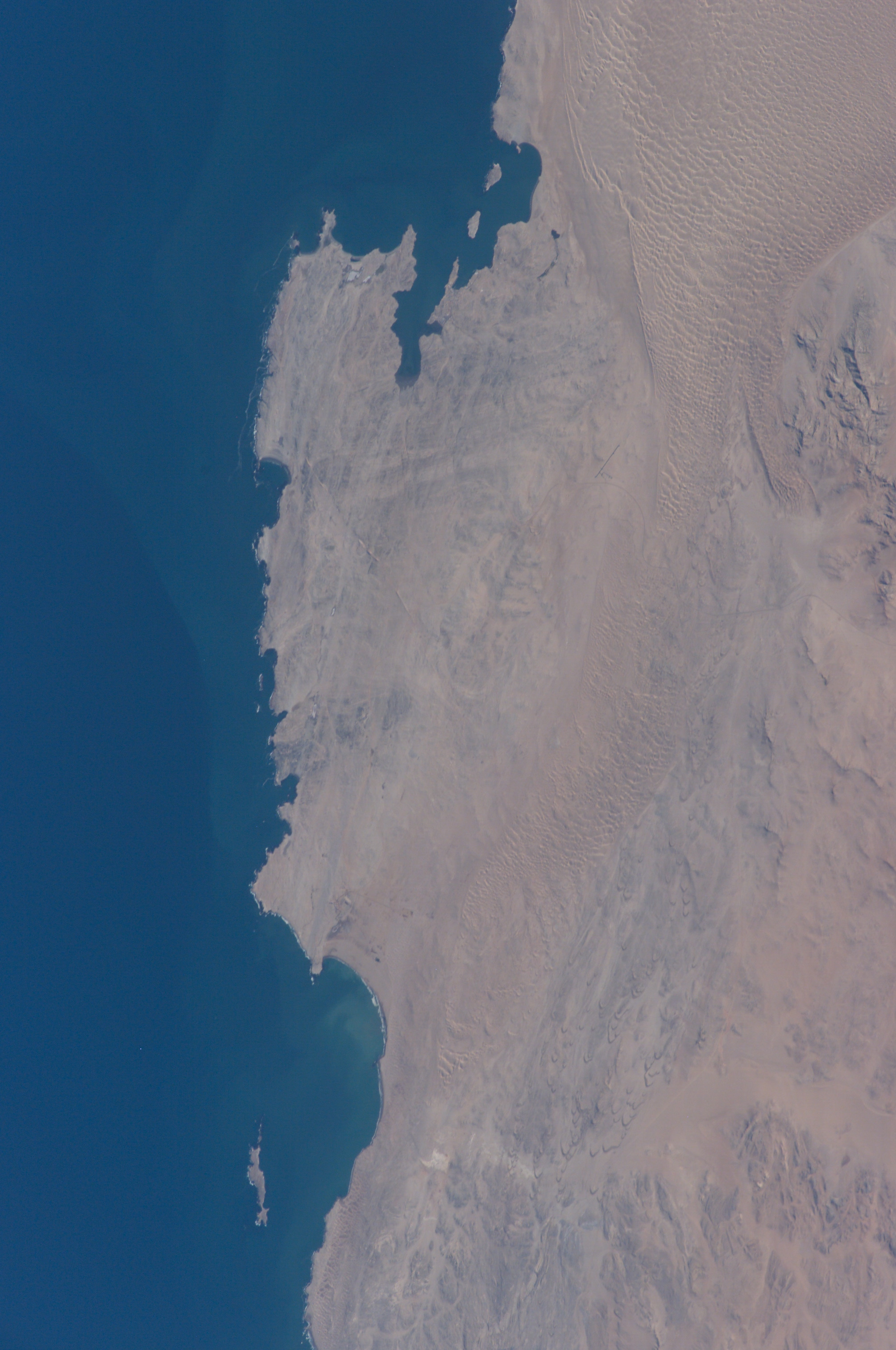 NAMIBIA: LüDERITZ,DIAZ POINT